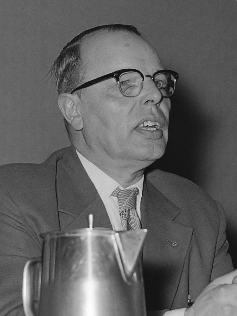 Vergadering KNVB over voetbalpool. Ir. Hopster (voorzitter) 26 januari 1957